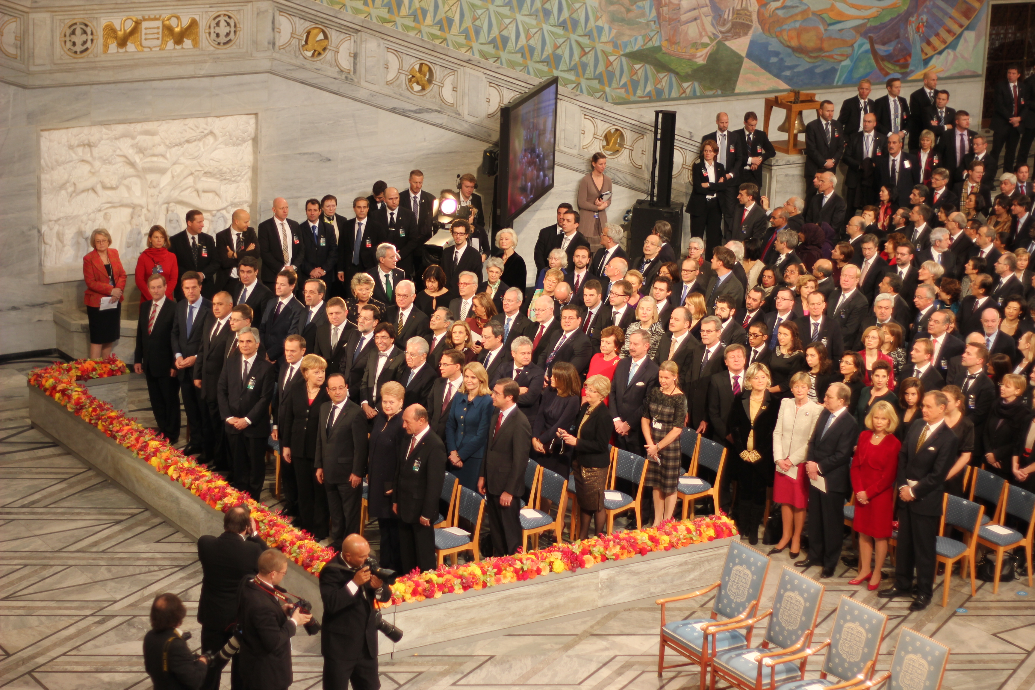 Ministru prezidents Valdis Dombrovskis Norvēģijas galvaspilsētā Oslo piedalās Nobela miera prēmijas pasniegšanas ceremonijā Eiropas Savienībai